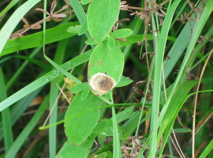 Mine von Ectoedemia septembrella